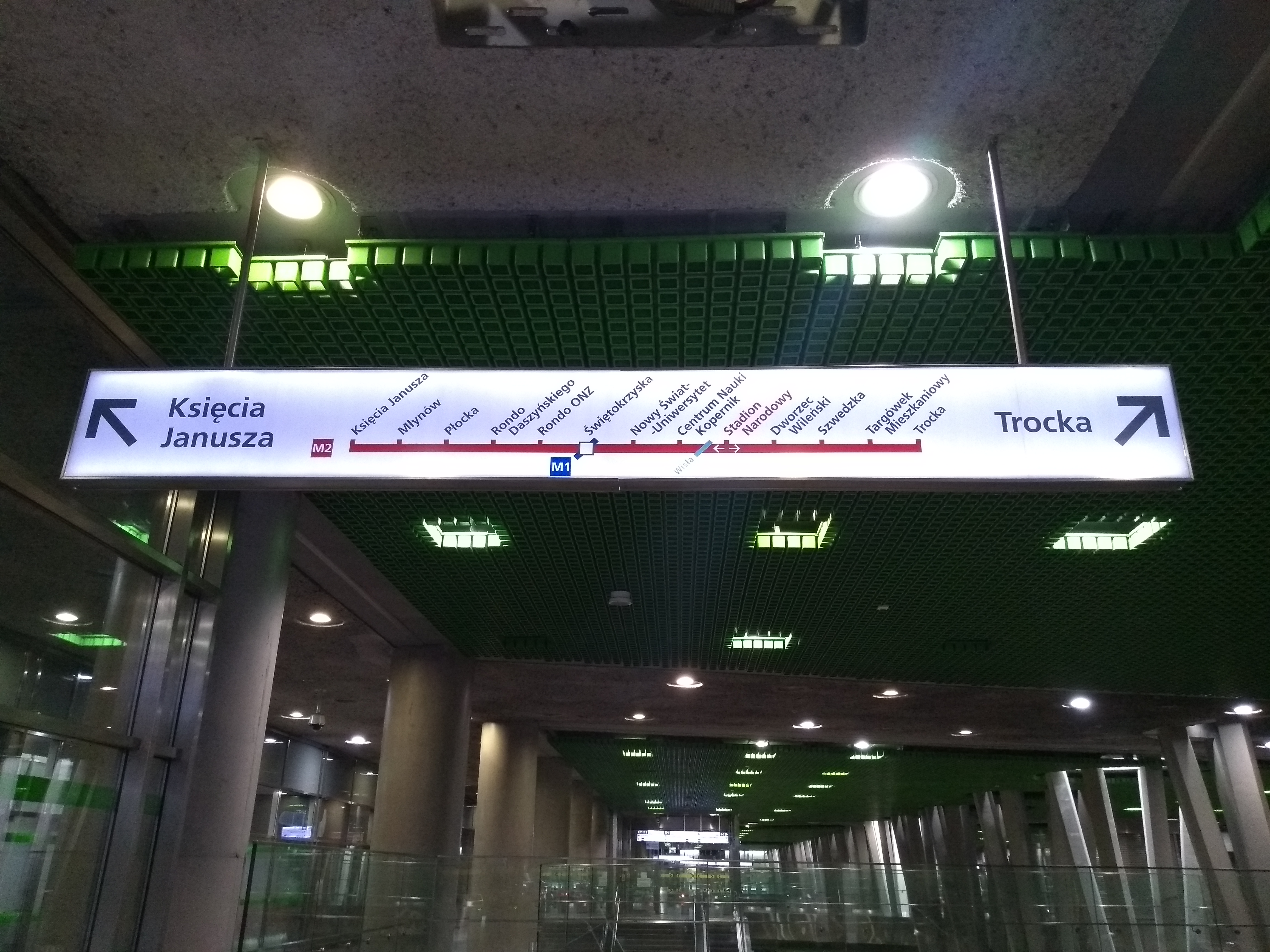 Tablica informacyjna ze schematem linii M2 na stacji metra Stadion Narodowy